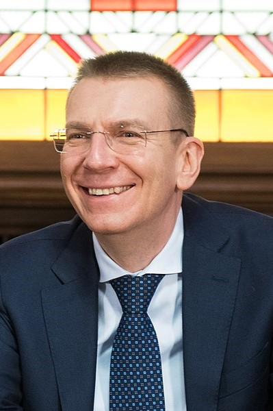 2019.gada 23.janvāris. 13.Saeimā pārstāvēto un valdību veidojošo politisko partiju – partiju apvienības “Jaunā Vienotība”, politiskās partijas “KPV LV”, Jaunās konservatīvās partijas, partiju apvienības “Attīstībai/Par!” un Nacionālās apvienības “Visu Latvijai!”-“Tēvzemei un brīvībai/LNNK” – sadarbības līguma, Fiskālās disciplīnas līguma un Krišjāņa Kariņa vadītā Ministru kabineta deklarācijas svinīgā parakstīšana. Foto: Ieva Ābele, Saeima Izmantošanas noteikumi: saeima.lv/lv/autortiesibas